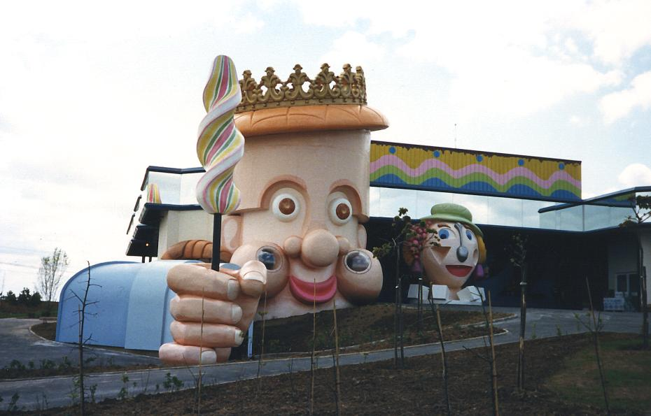 Le Palais de Dame Tartine à Mirapolis (Val-d'Oise, France).